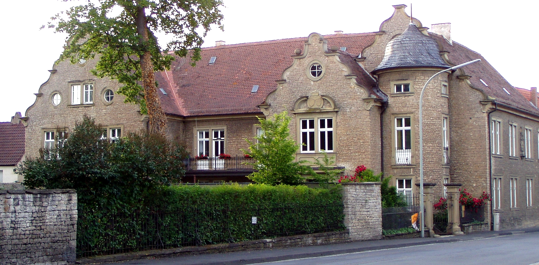 Das Neue Schloss in Wiesentheid